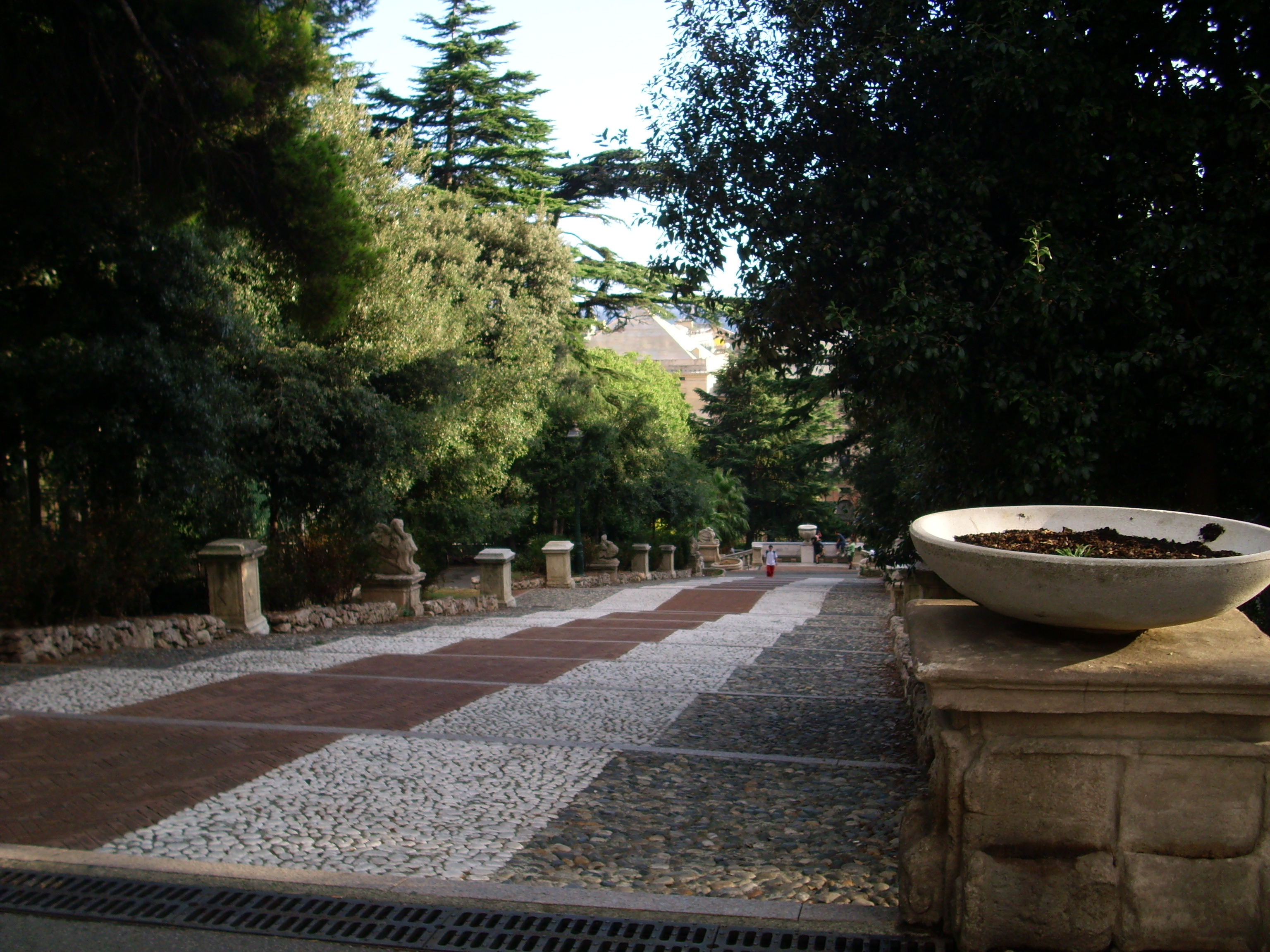 Il parco di Villa Imperiale Scassi, Genova Sampierdarena